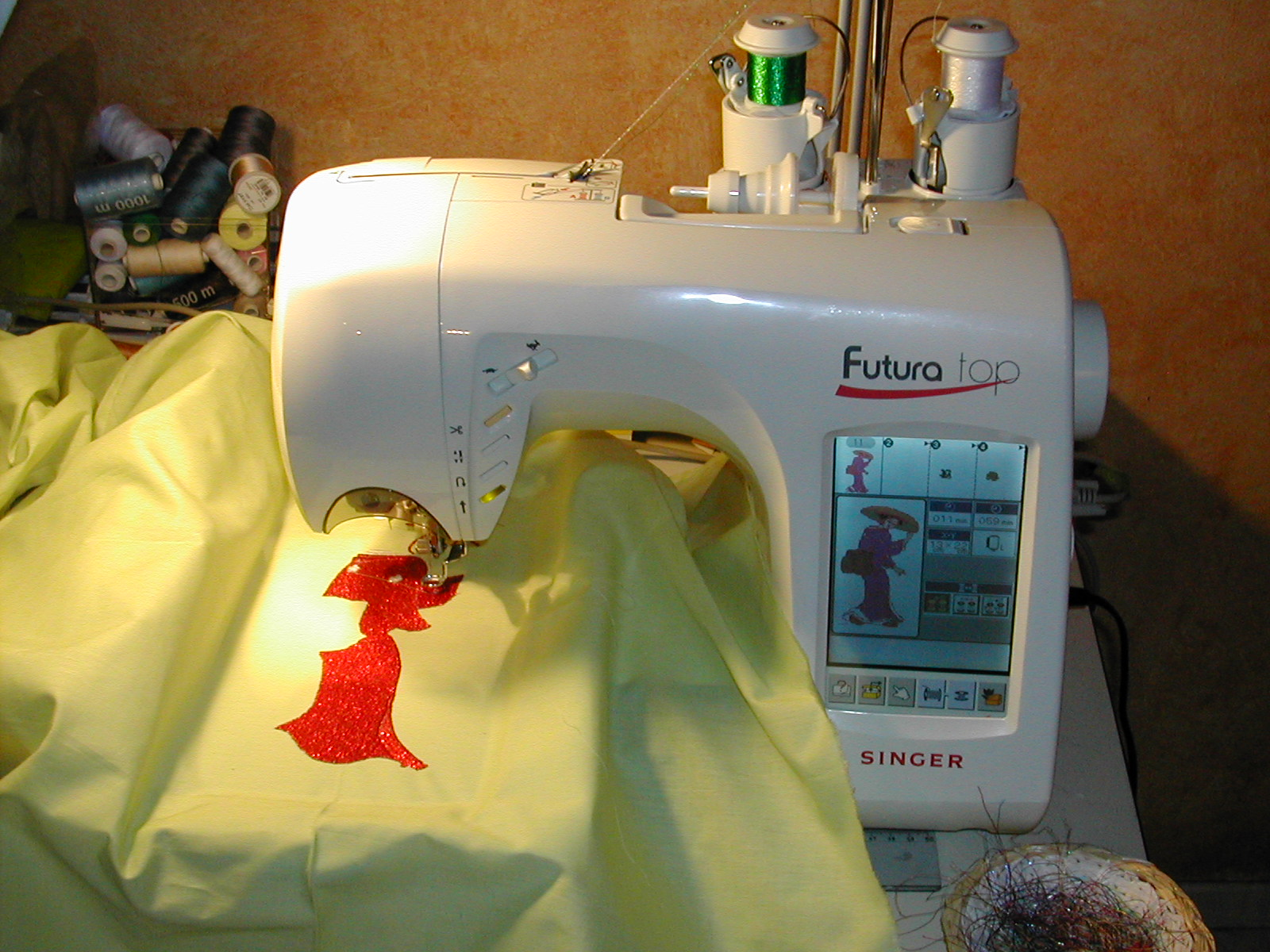 Singer Futura Top or XL 6000